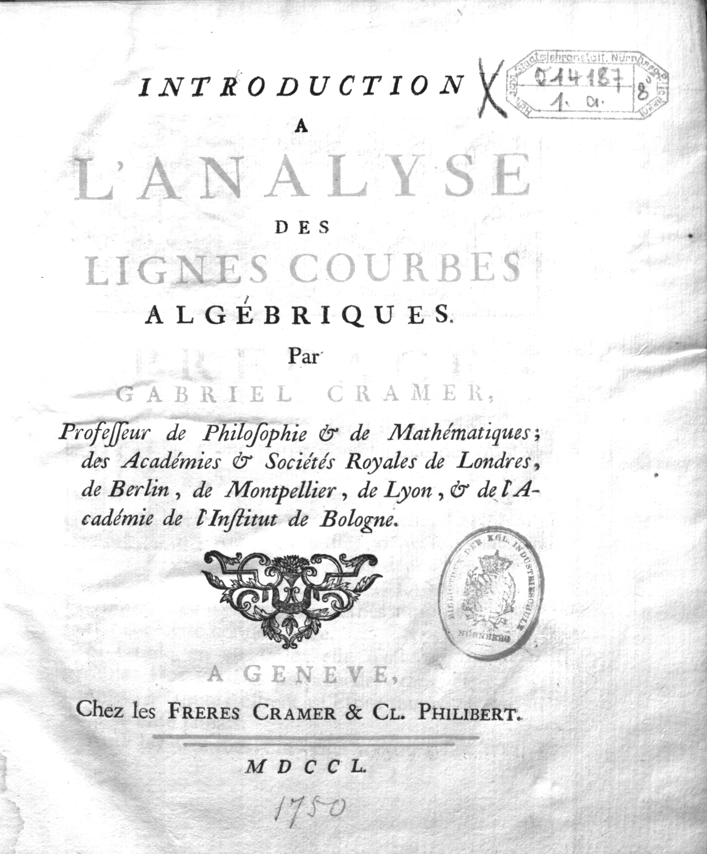 The front page of Gabriel Cramer's book “Introduction a l’analyse de lignes courbes algébriques”.